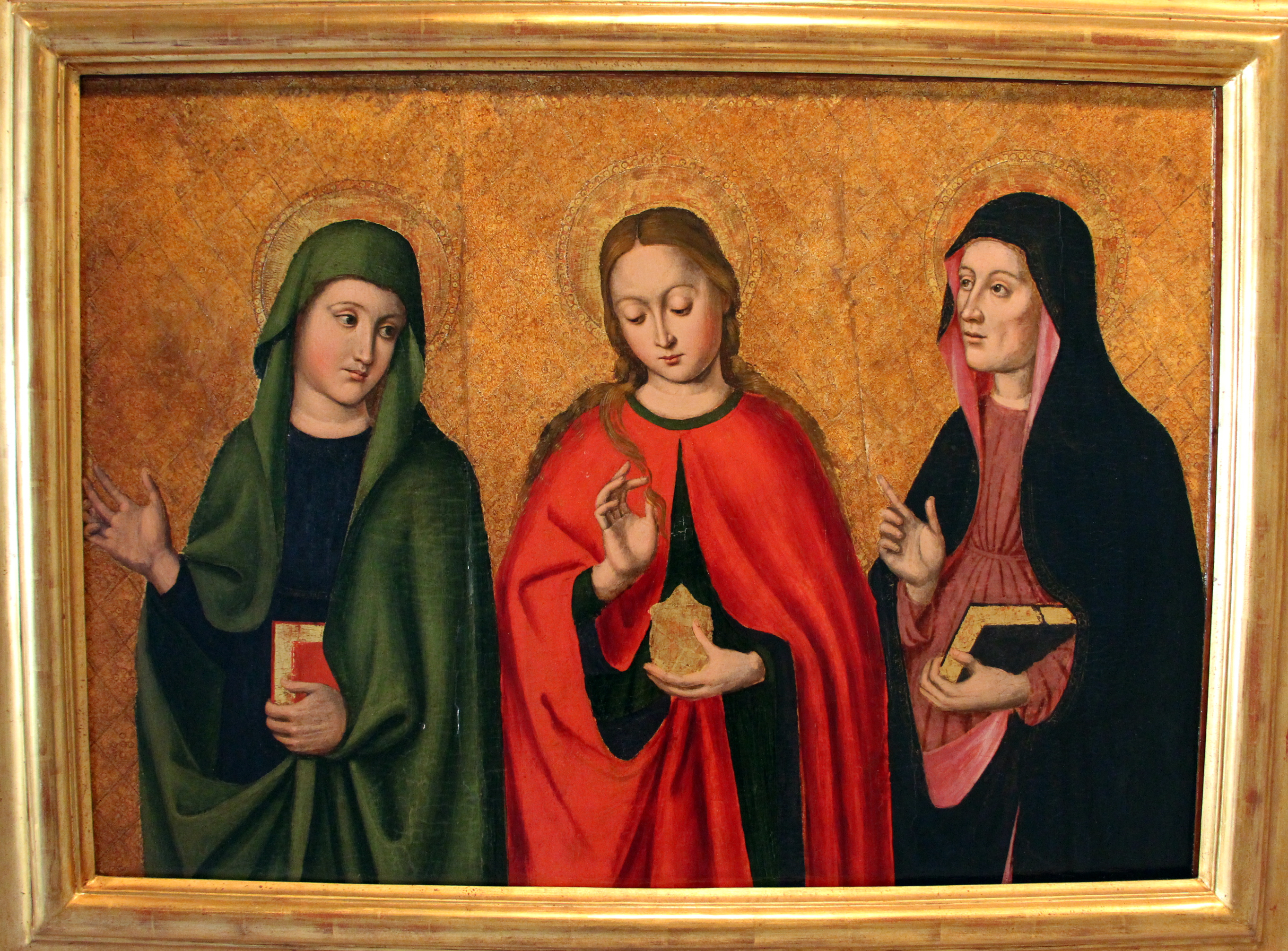 maria maddalena tra due santetitle QS:P1476,it:"maria maddalena tra due sante" label QS:Lit,"maria maddalena tra due sante"